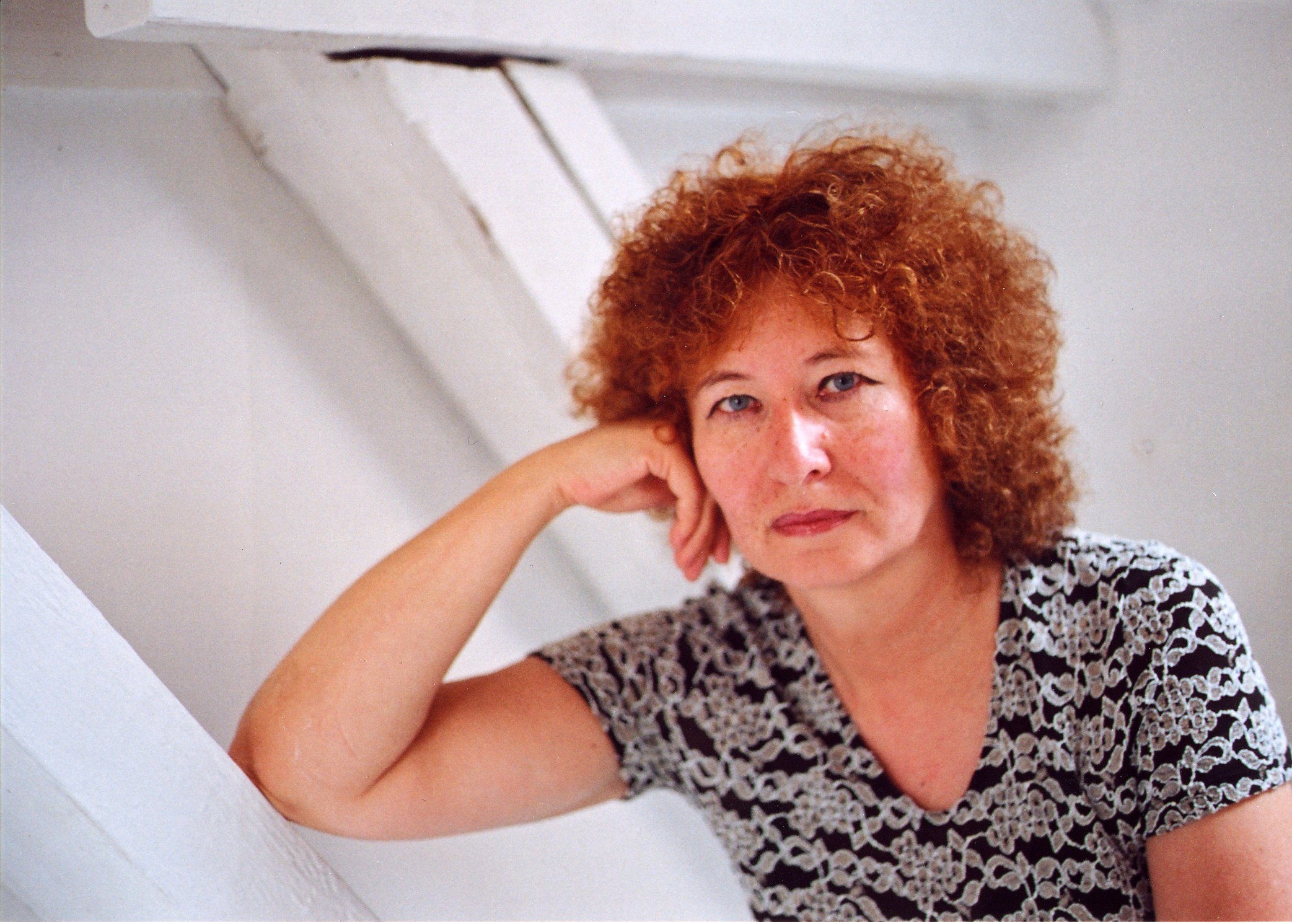 Margit Schreiner Portrait